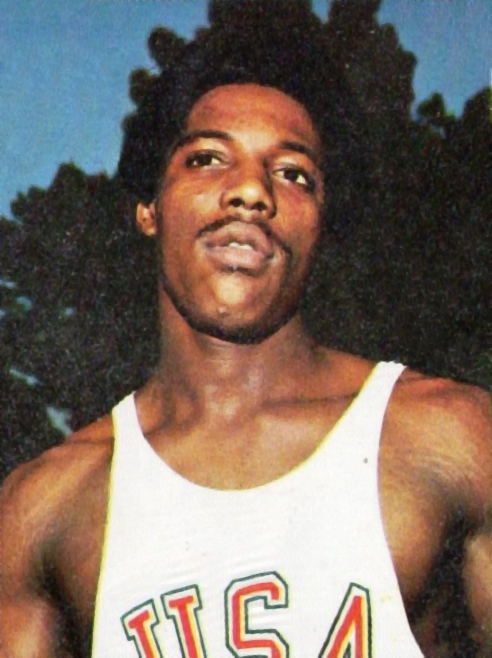 CAMPIONI dello SPORT 1973/74-Figurina n.68- BLACK - USA -ATL.LEGGERA-Rec